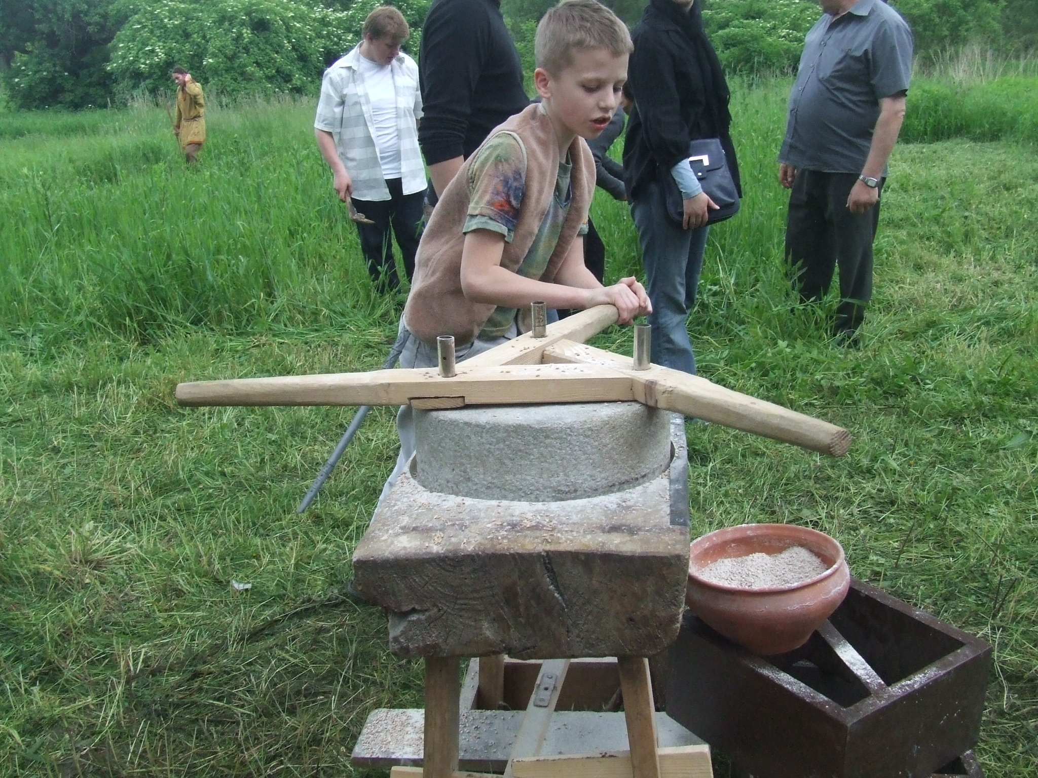 VIII Krakowski Piknik Archeologiczny - 29 maj 2010